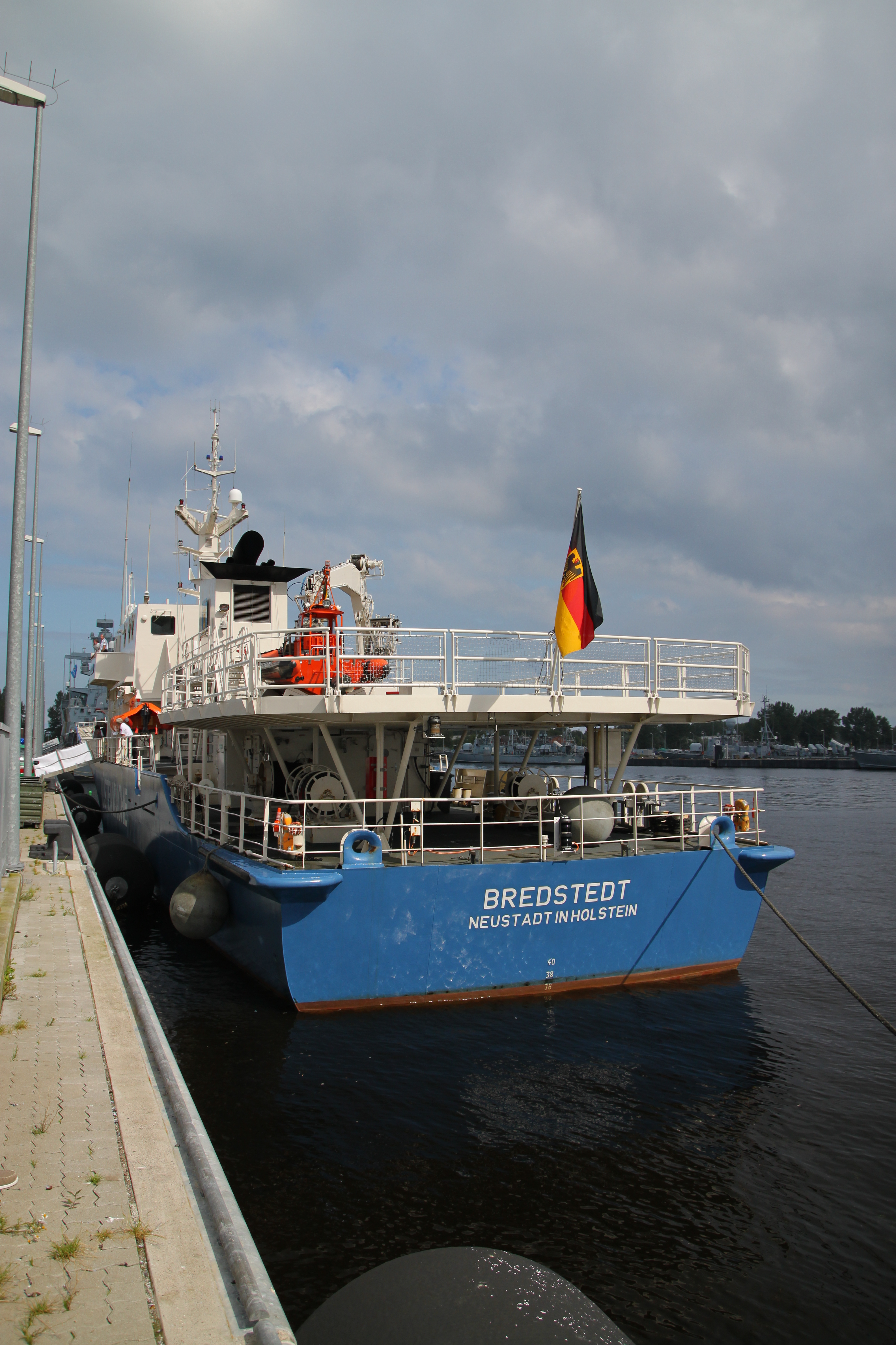 Bredstedt der Küstenwache (BP 21) Hanse Sail 2011